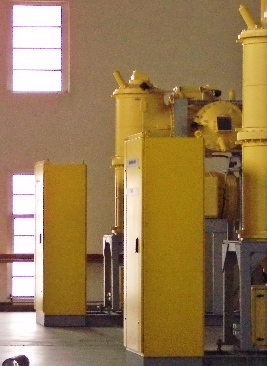 Teil einer SF6-Schaltanlage, in einer Umspannstation